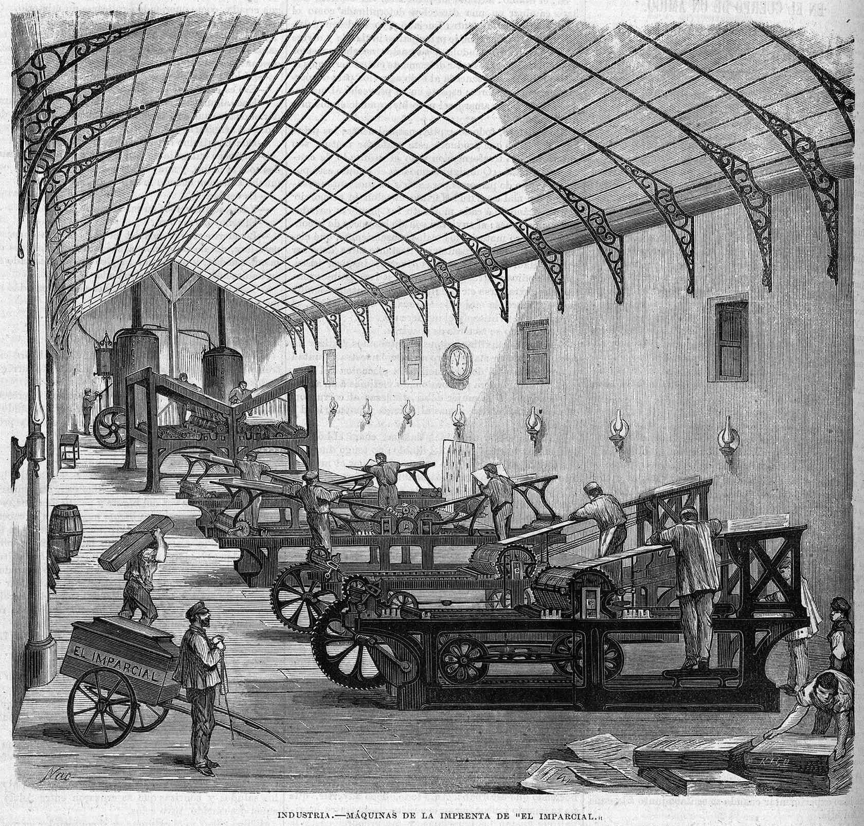 Industria - Máquinas de la imprenta de El Imparcial, en la revista La Ilustración de Madrid.